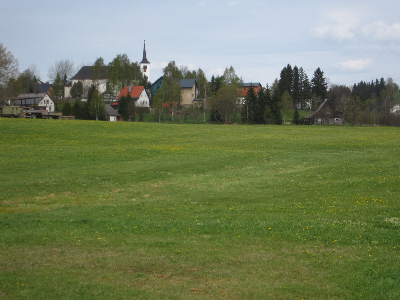 Kostel svatého Jana Křtitele, Kunštát (Orlické Záhoří).